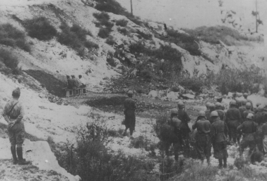 Srpskohrvatski / српскохрватски: Italijani streljaju zarobljene partizane na Cetinju 1941.